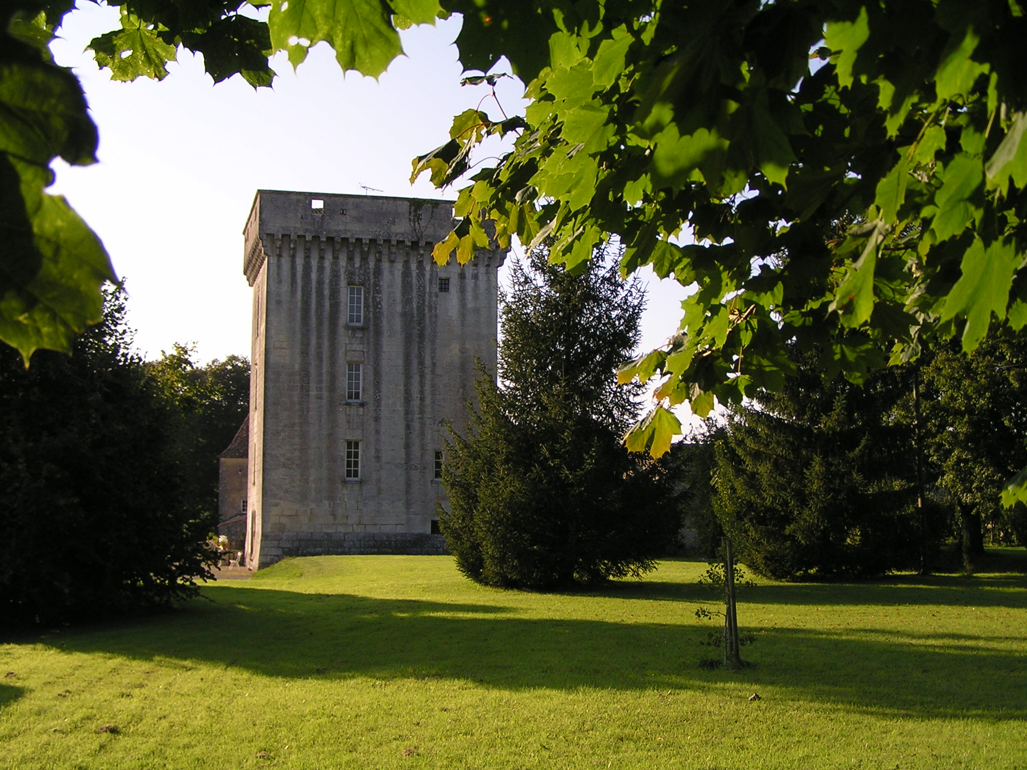 Tour du Breuil à Dignac